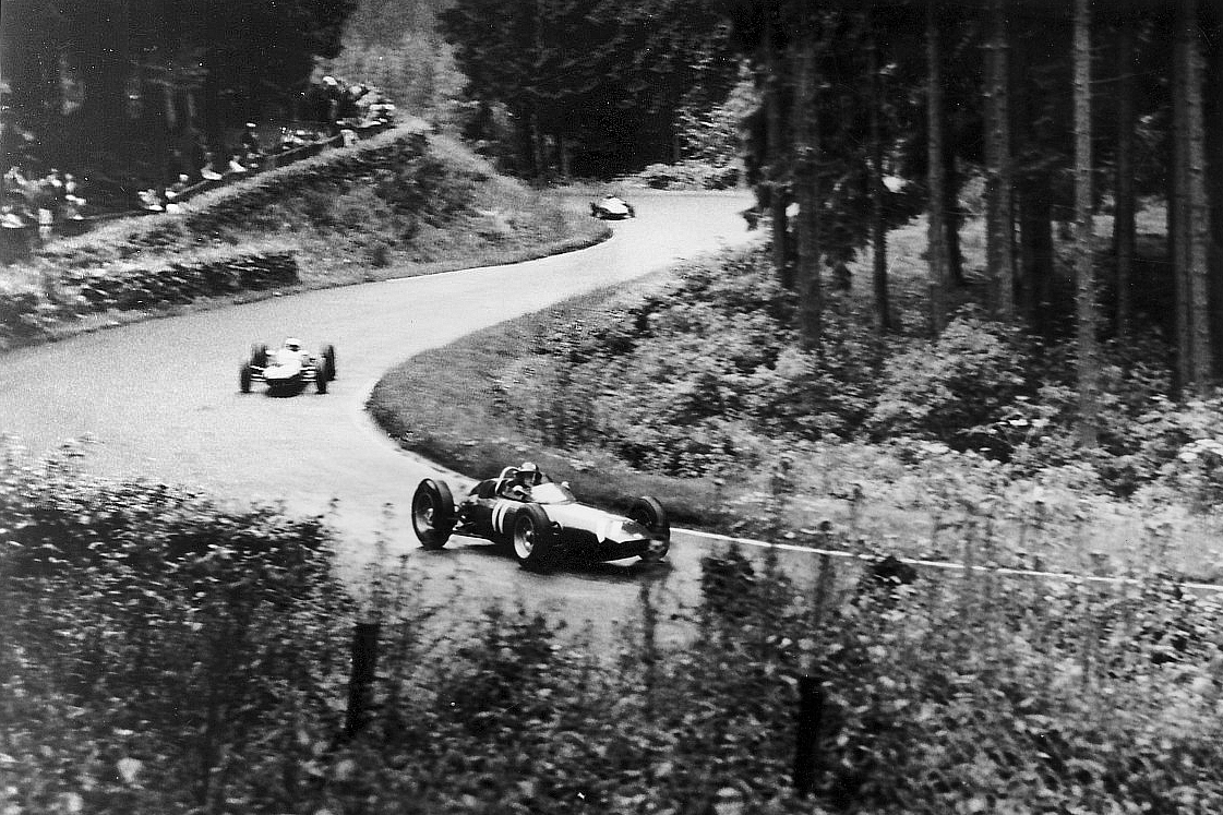 Großer Preis von Deutschland auf dem Nürburgring: Graham Hill (B.R.M.) vor John Surtees (Lola) und Dan Gurney (Porsche) im Streckenabschnitt Hatzenbach